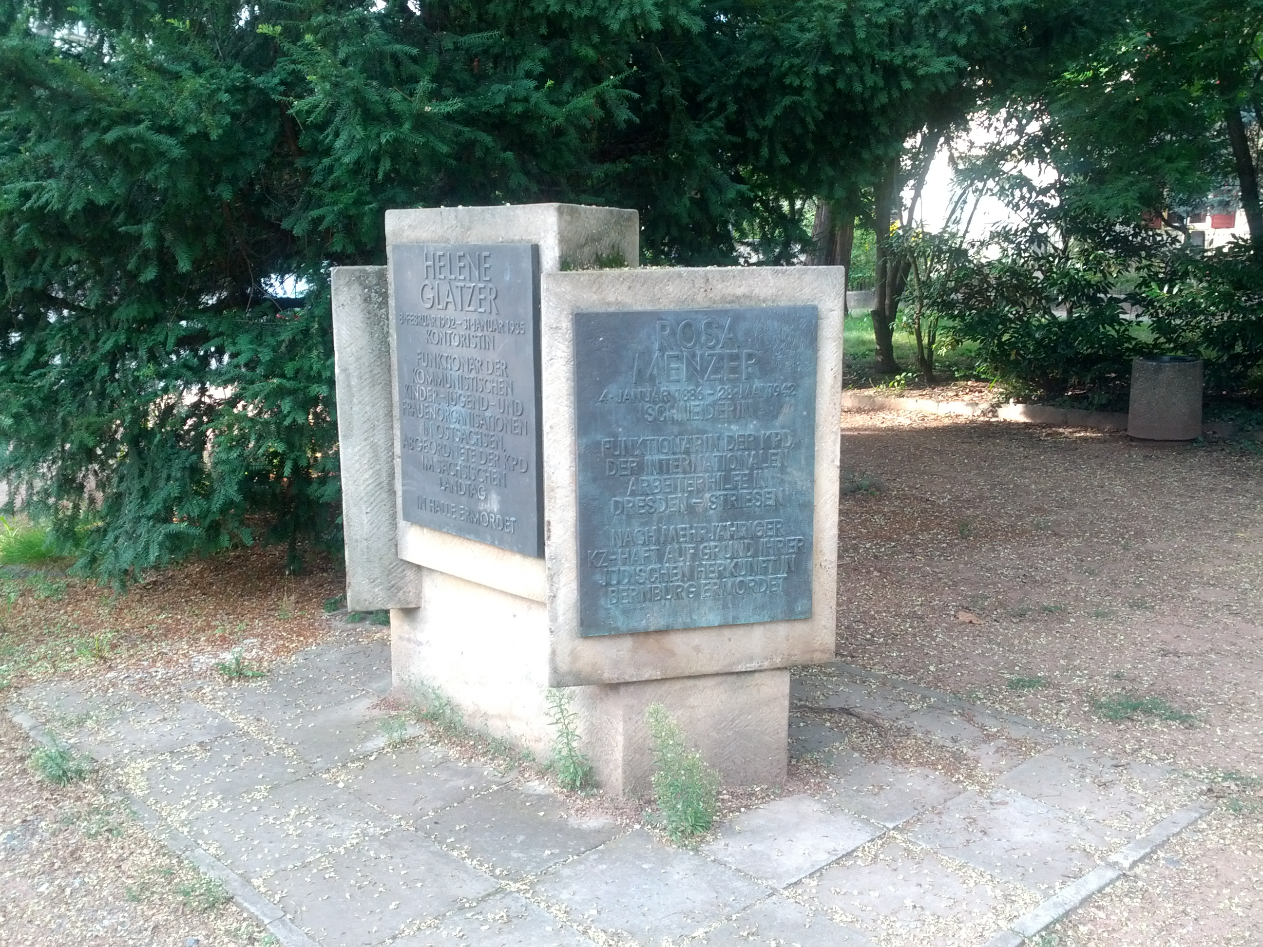 Denkmal am Barbarossaplatz in Dresden; Gedenktafel für Helene Glatze und Rosa Menzer